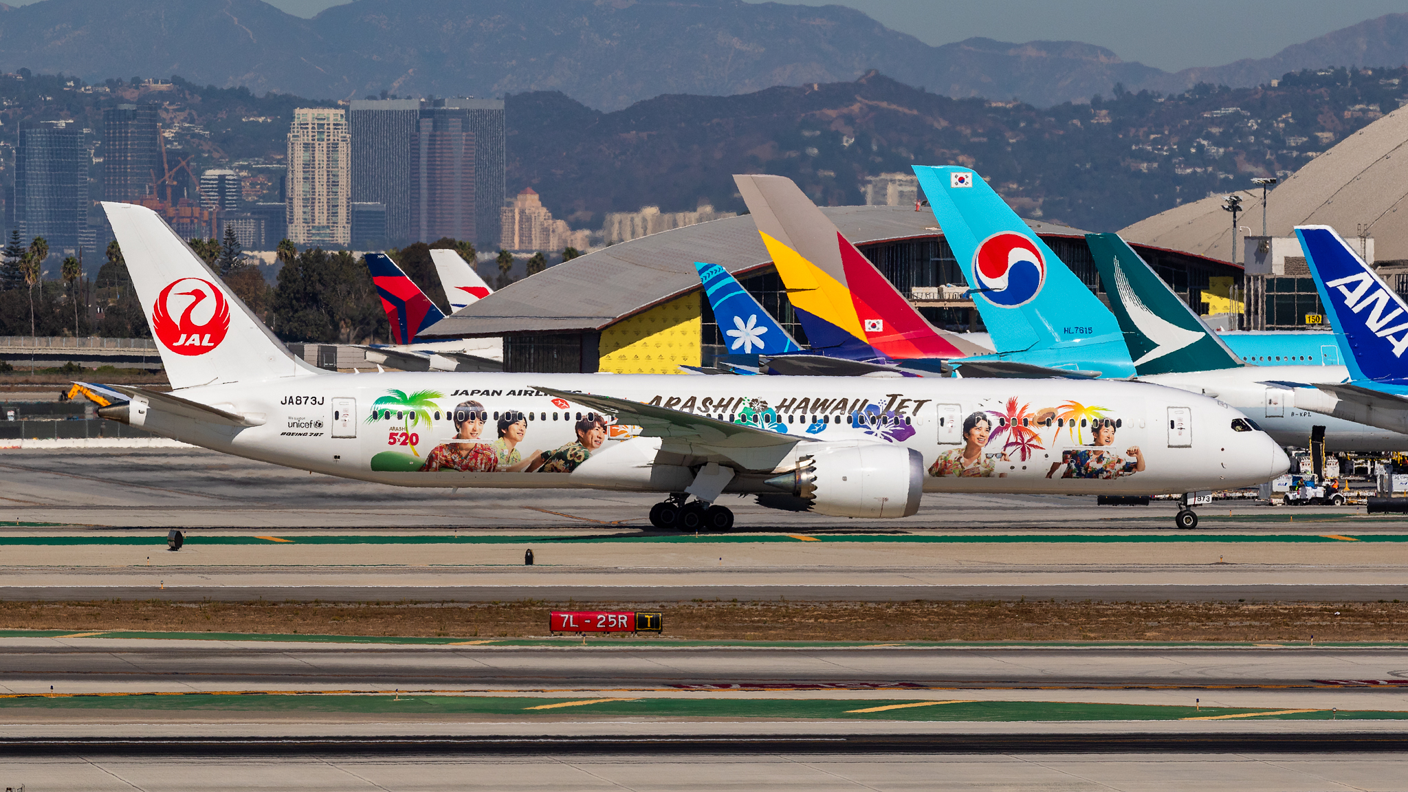 JA873J_KLAX_NAS